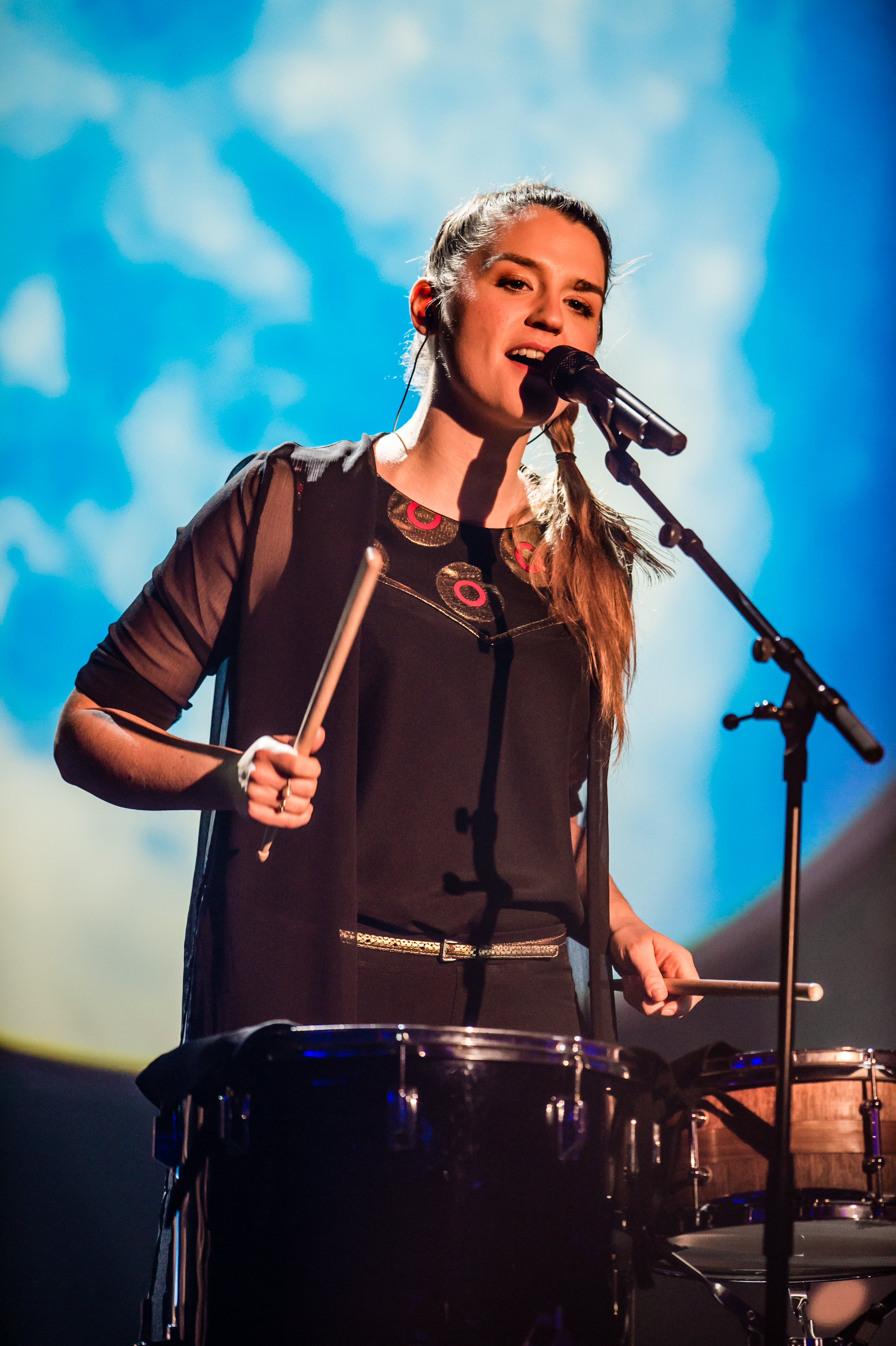 Eurovision Song Contest 2016 - Unser Lied für Stockholm - Joco